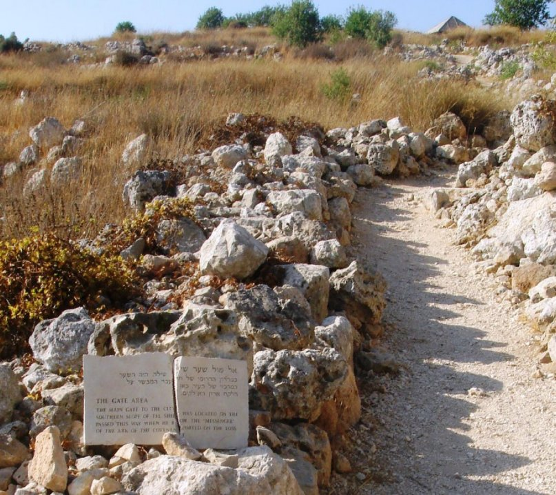 Camino de Silo. El área de la puerta. La puerta principal de la ciudad estaba situada en la ladera sur de la colina de Silo el "mensajero" pasó por aquí cuando iba a informar sobre la pérdida del arca de la alianza.